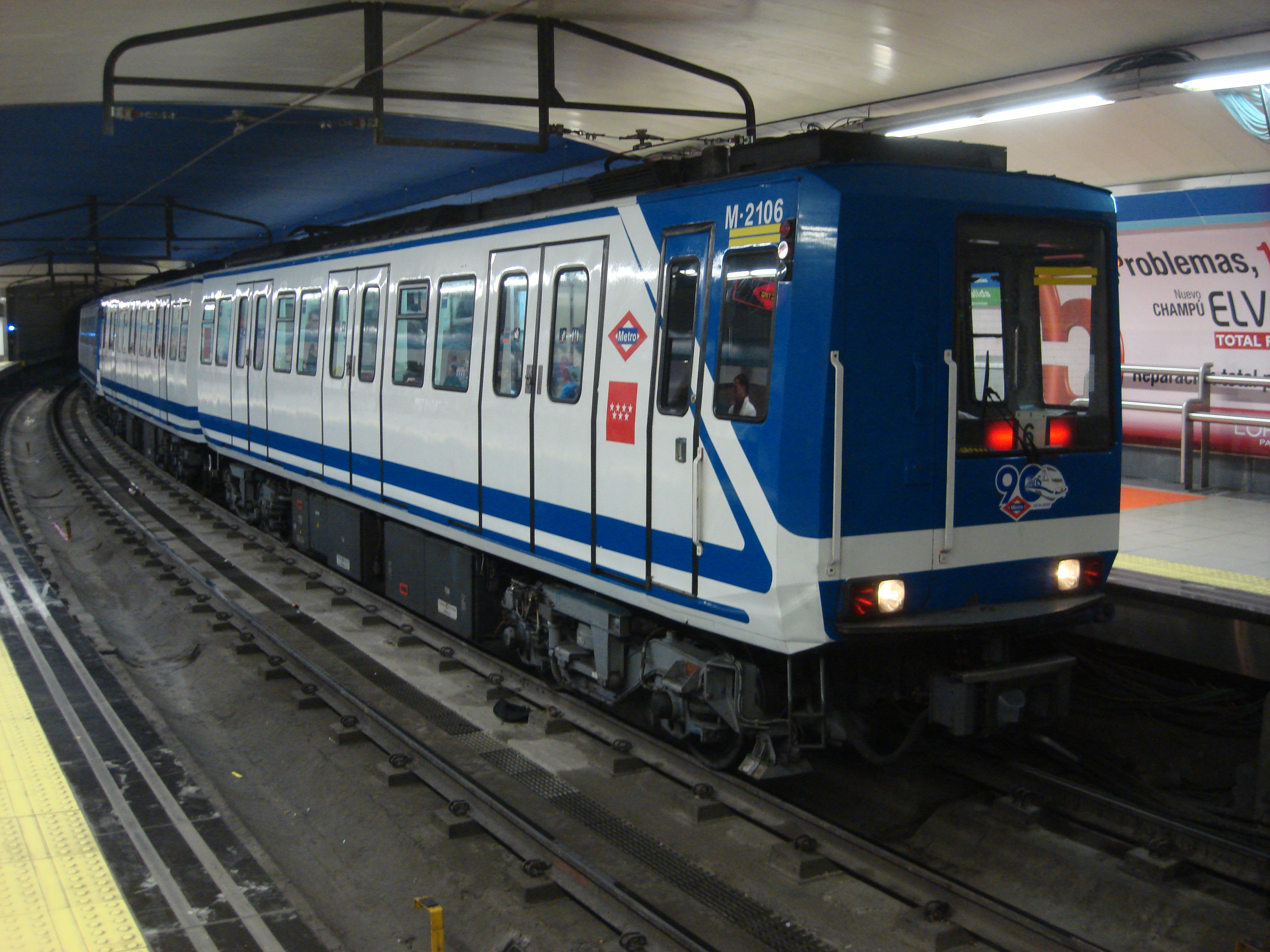 Own work